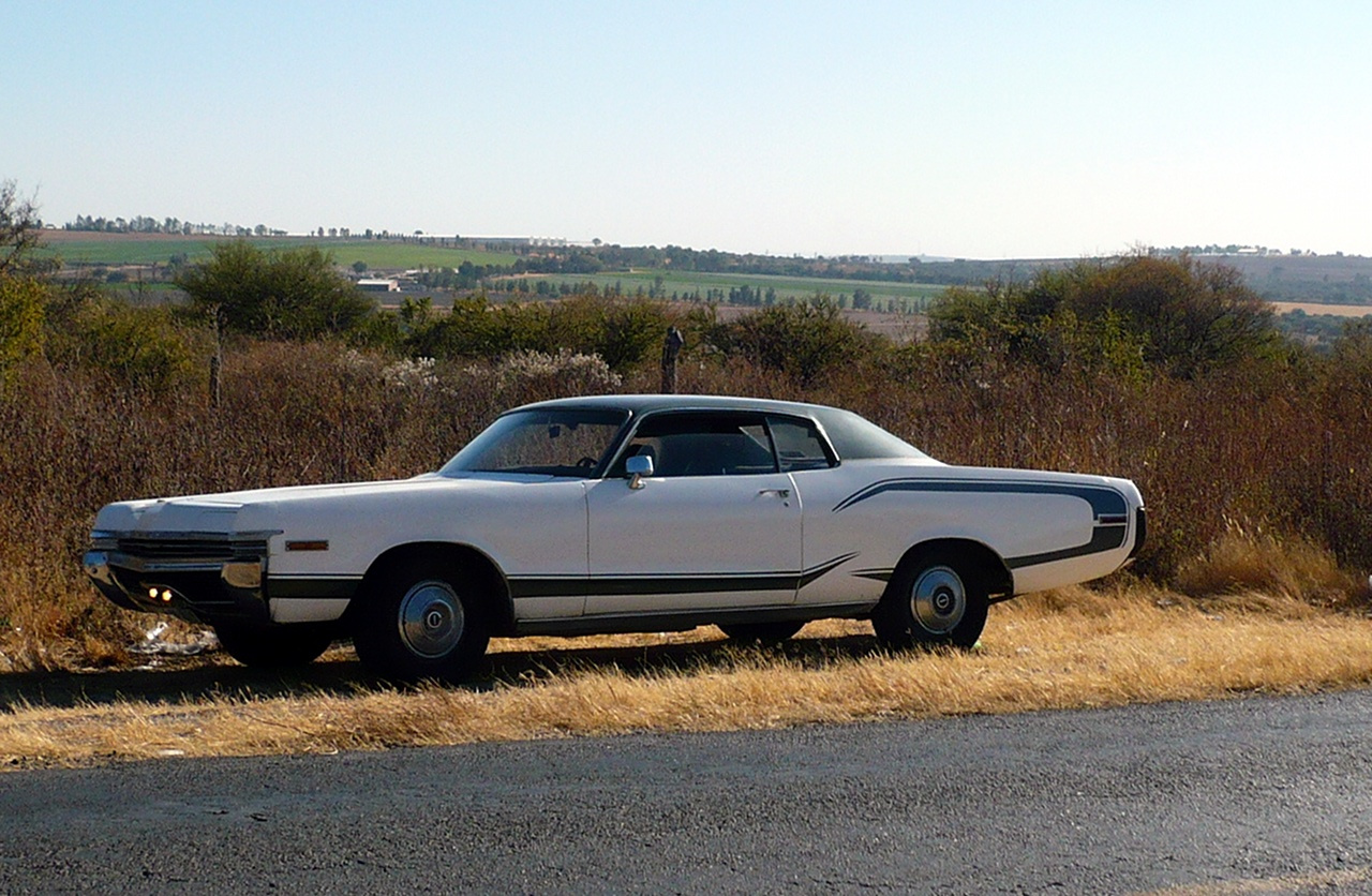 Dodge Mónaco 1972 en una carretera de México